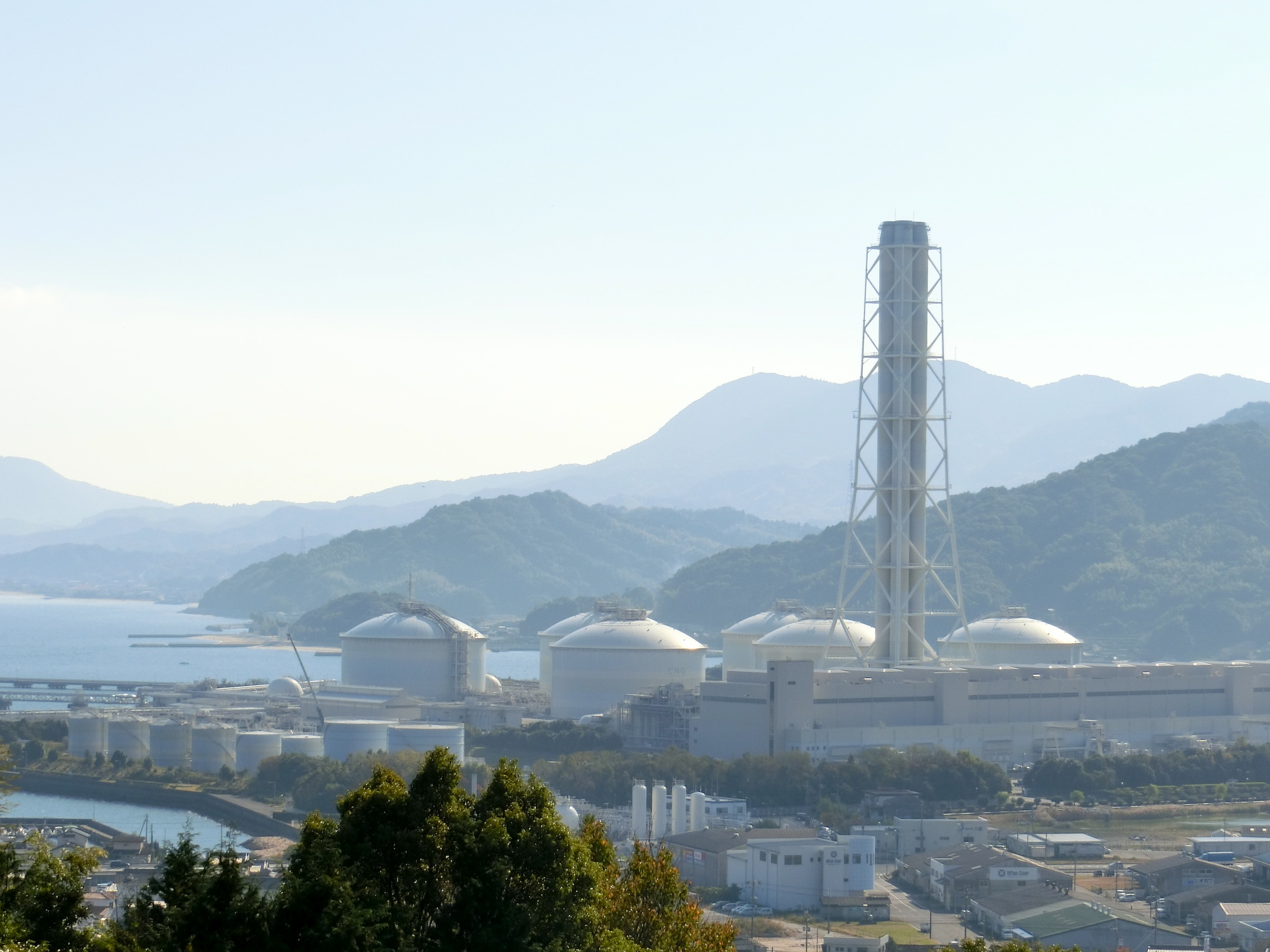 柳井発電所の遠景（柳井市）。柳井茶臼山古墳頂上より撮影。